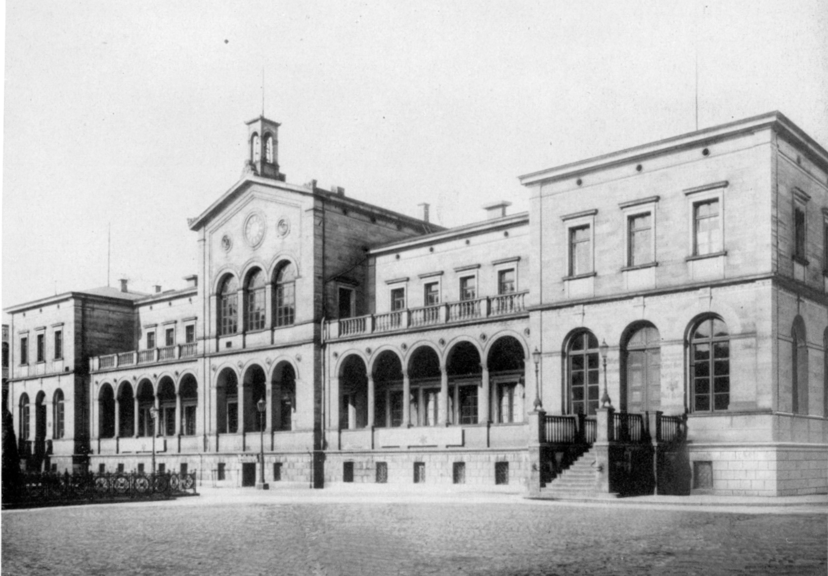 Ludwigsbahnhof (Vorderseite)